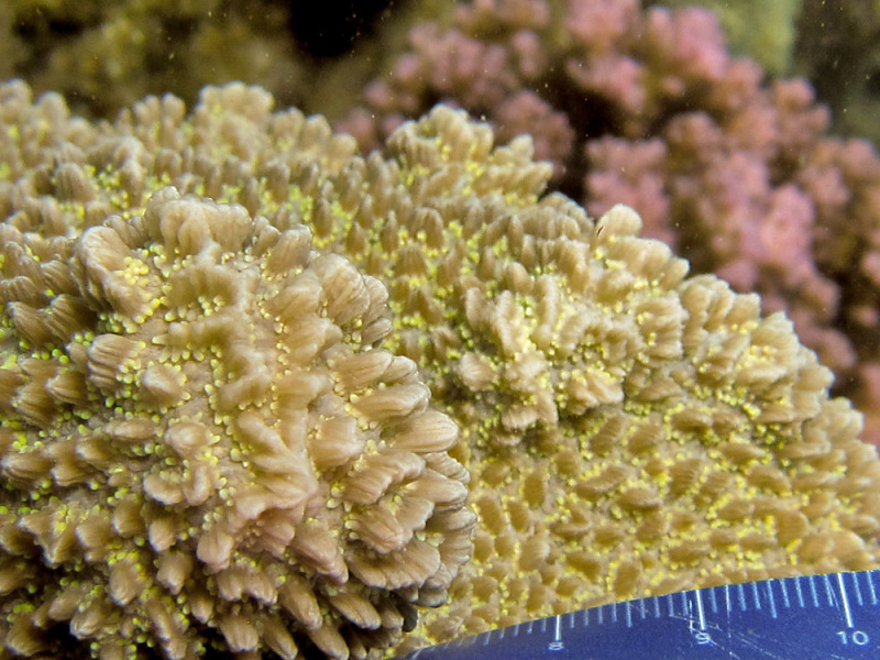 Hydnophora exesa, detalle de los montículos salientes del corallum, rodeados de los tentáculos. Isla Lizard, Australia